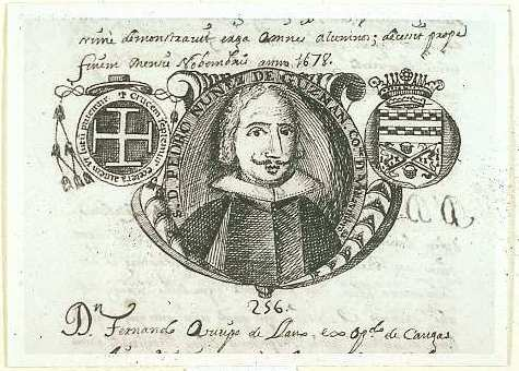 Retrato de Pedro Núñez de Guzmán y Niño, conde de Villumbrosa. Fotografía del dibujo que figura en el manuscrito 940 149 de la Biblioteca Nacional de España.